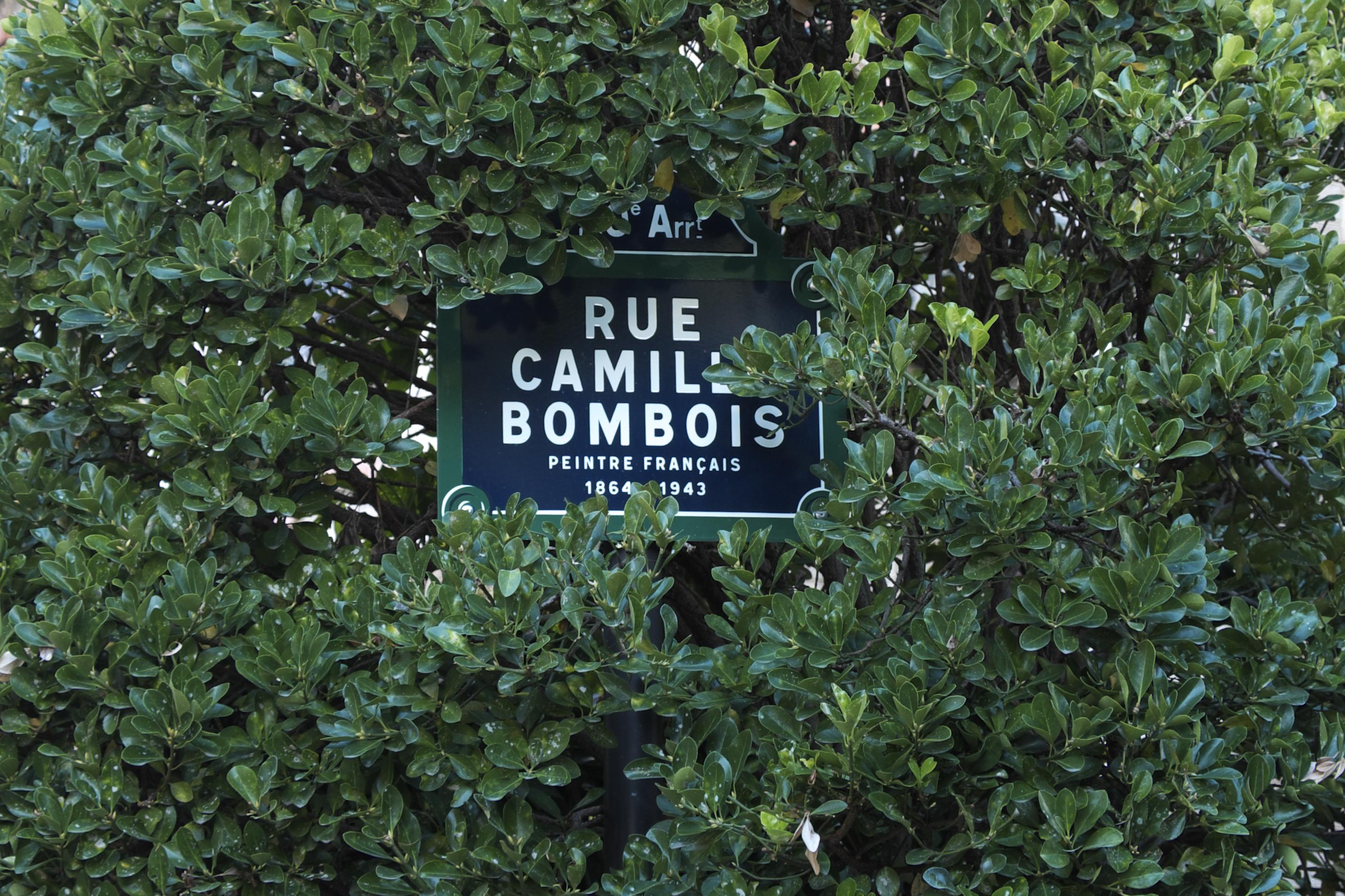 La Campagne à Paris im 20. Arrondissement in Paris (Frankreich), Straßenschild RUE CAMILLE BOMBOIS